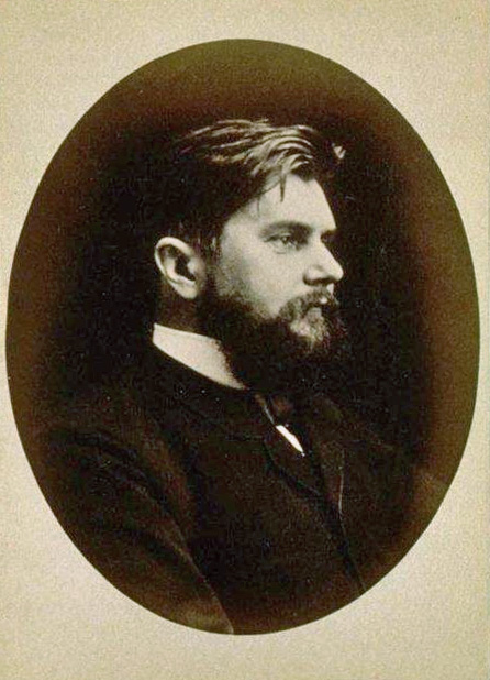 Victor Henry. Meyer, Antoine. Photographe. Bibliothèque nationale et universitaire de Strasbourg